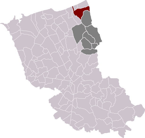 Locatie gemeente Gijvelde in arrondissement Duinkerke. Zelfgemaakt. Location of Ghyvelde municipality in the arrondissement of Dunkirk. Self made. Localisation de la commune de Ghyvelde dans l'arrondissement de Dunkerque. Fait moi-même.